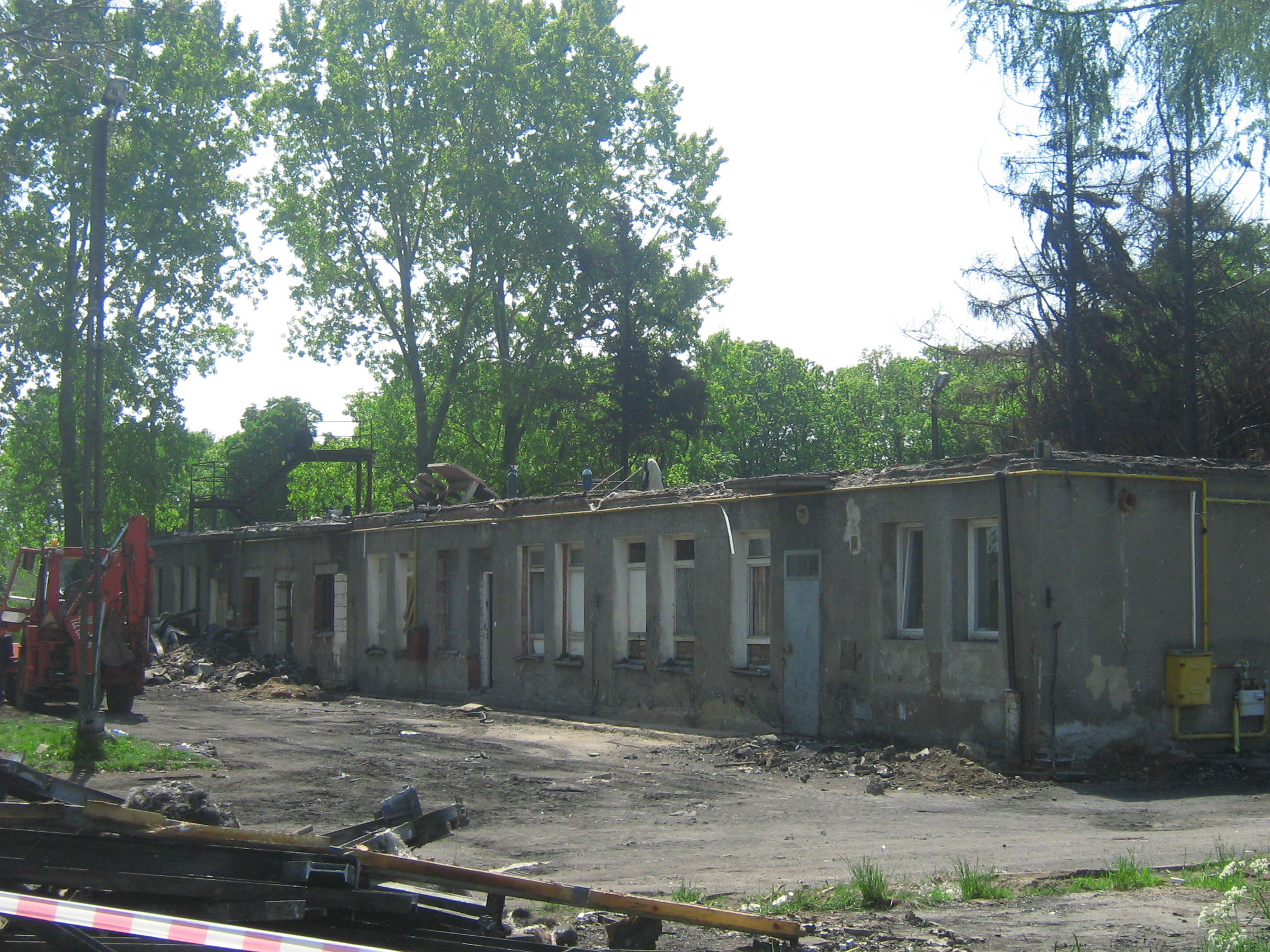 Hotel socjalny w Kamieniu Pomorskim w miesiąc po pożarze